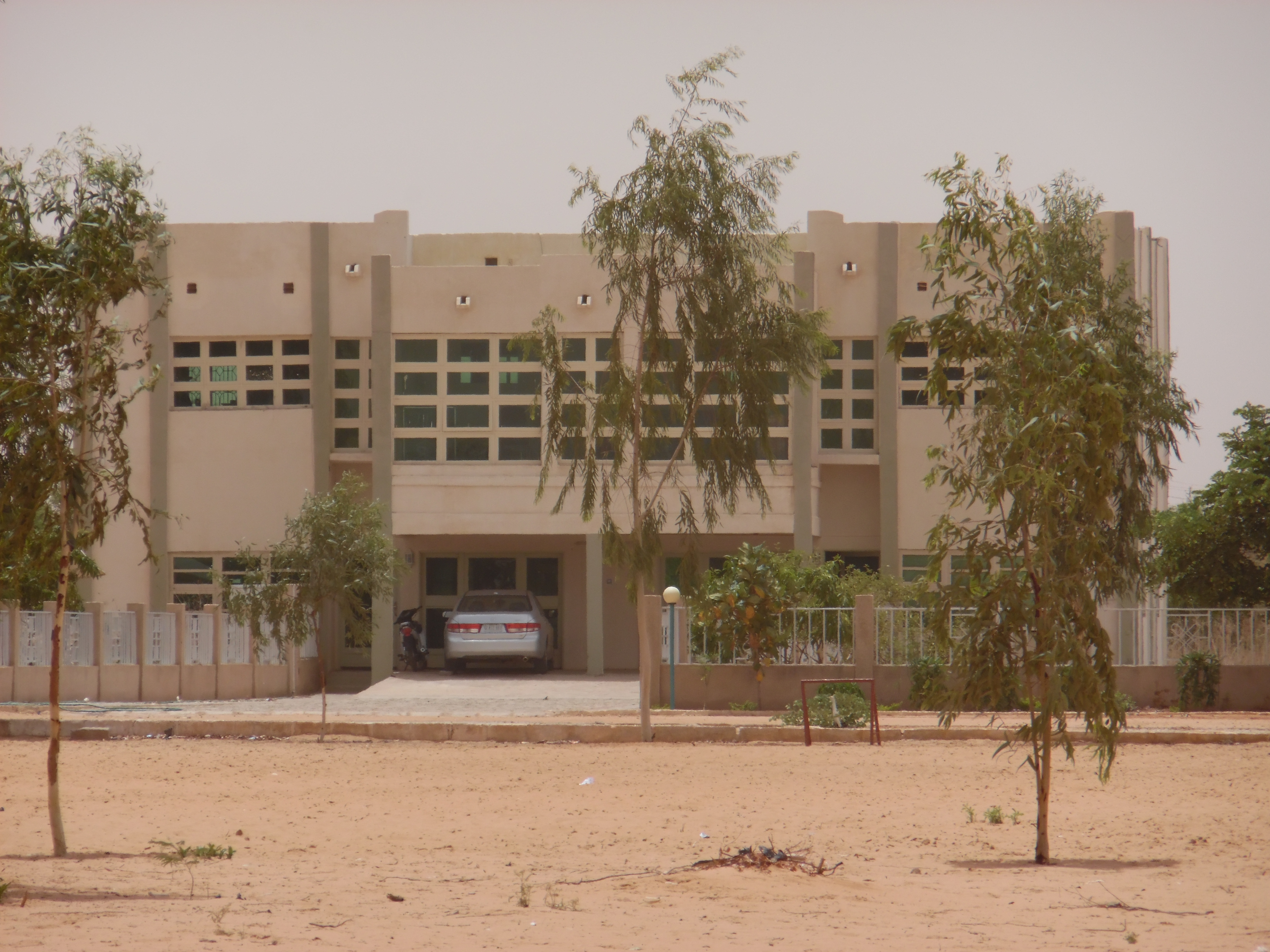 Service d'accueil du Projet Centre Hospitalier Universitaire